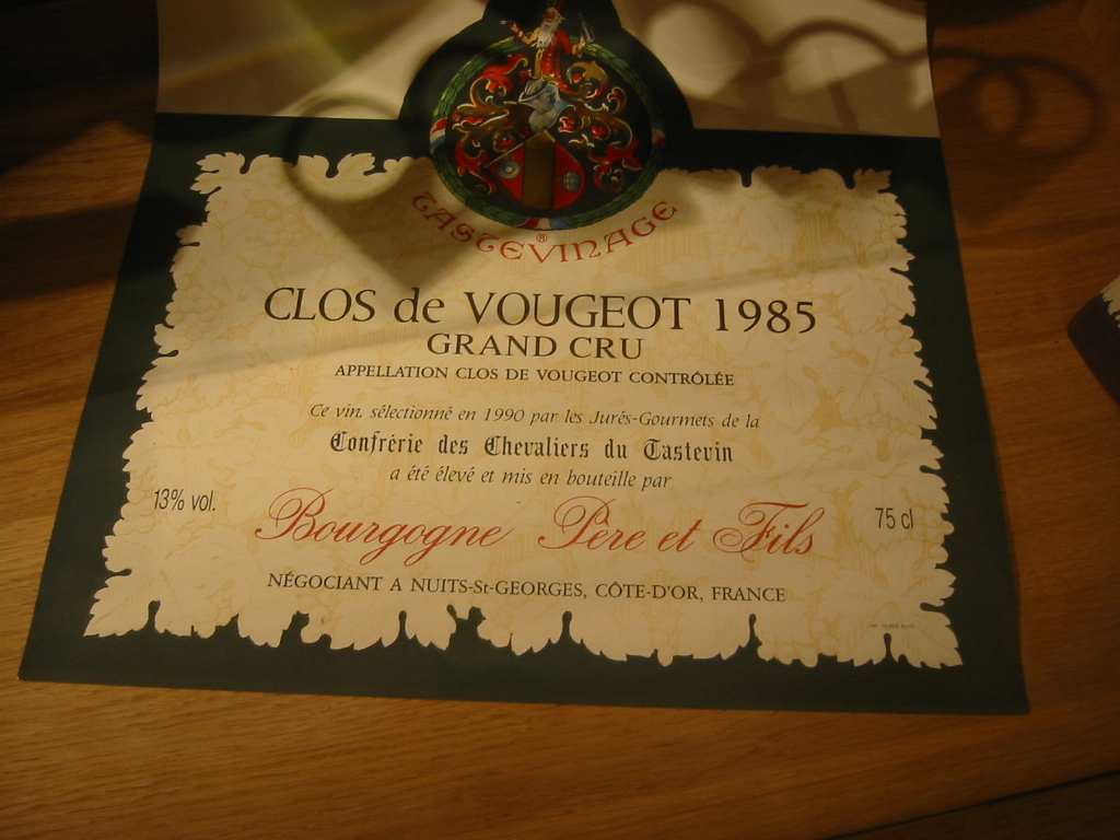 Etiquette Vin du Clos de Vougeot des Chevaliers de la confrérie de Tastevin